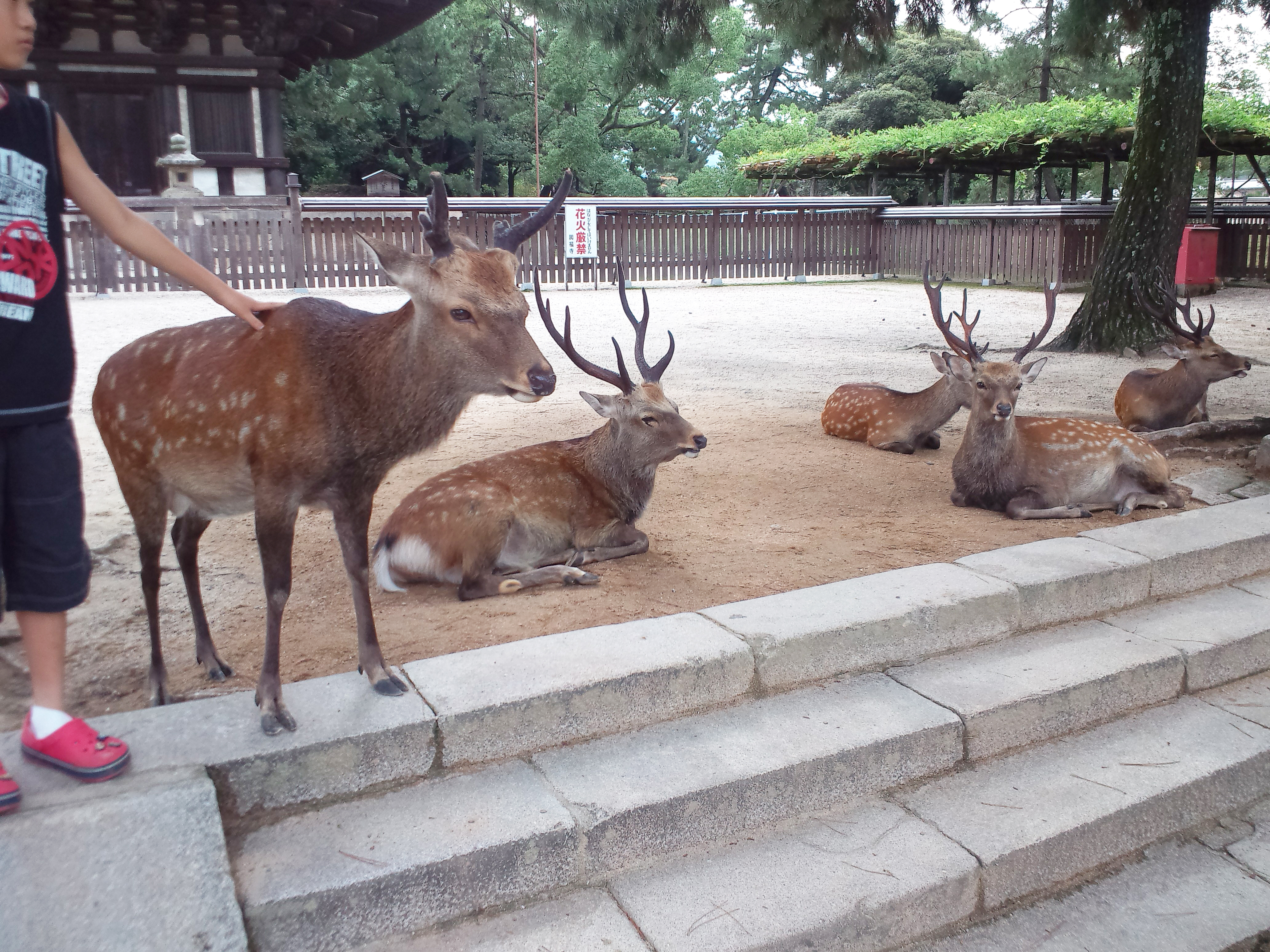 奈良公園の鹿